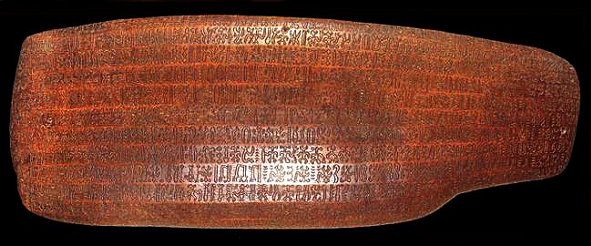 Verso of rongorongo Tablet B, Aruku Kurenga.